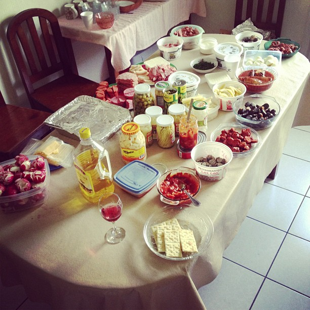 Listos para el fiambre